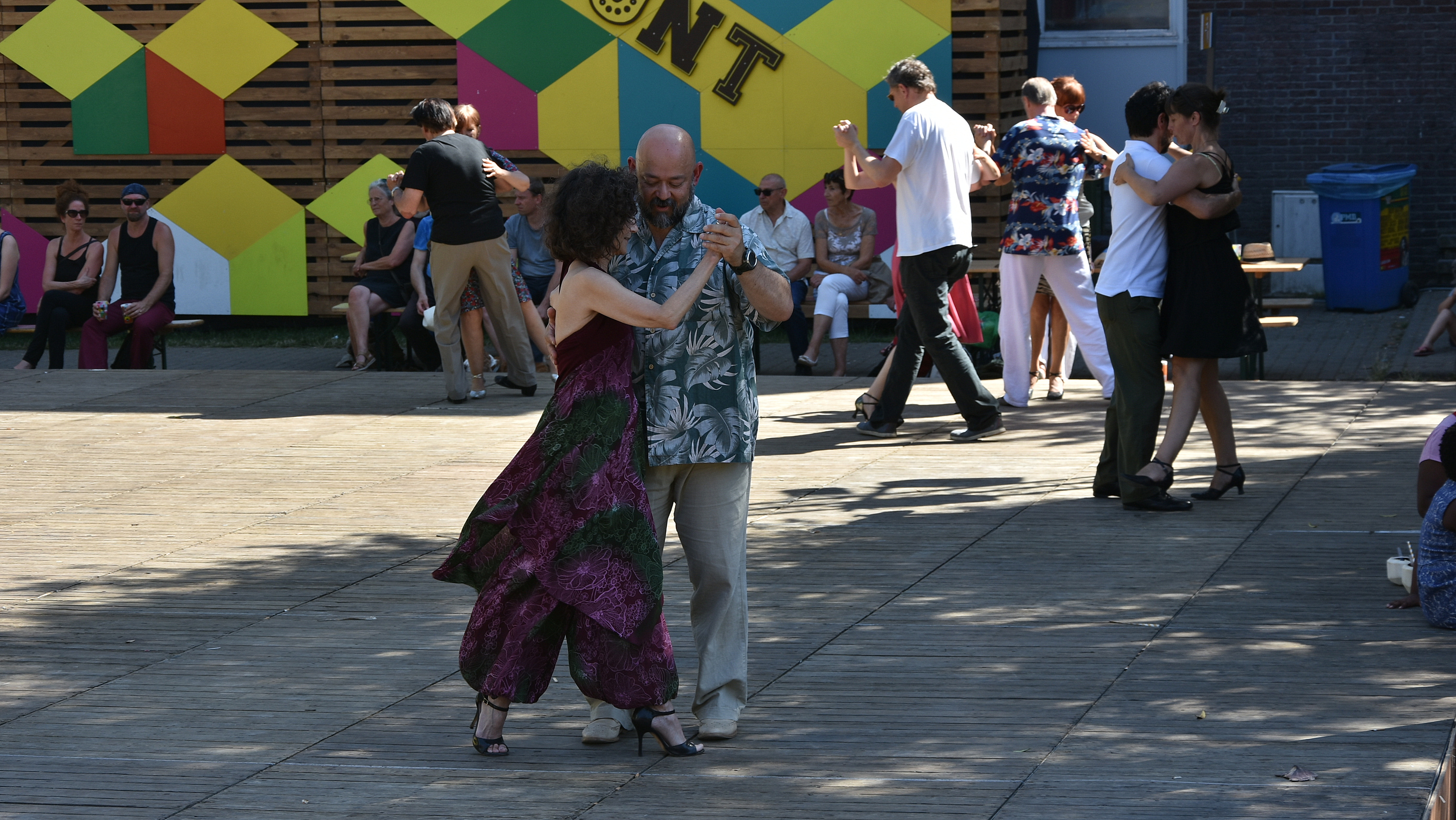 Tango Argentino Gentse Feesten 2019 22-07-2019 This photo of movable heritage has been taken in the Flemish Region